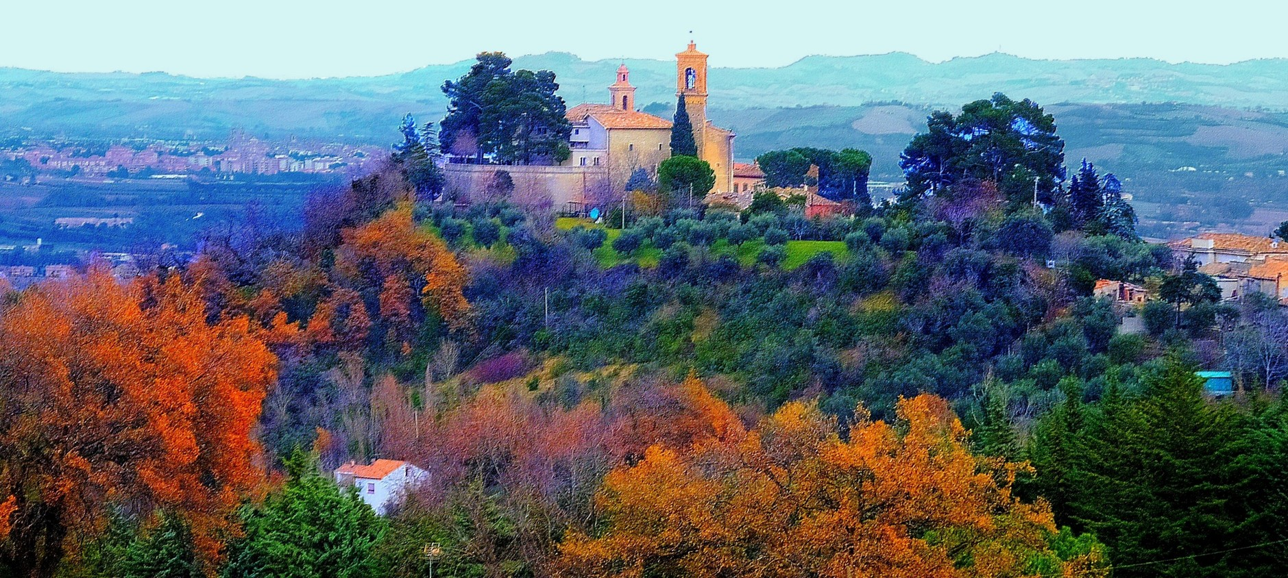 Veduta di Castelbellino Centro Storico